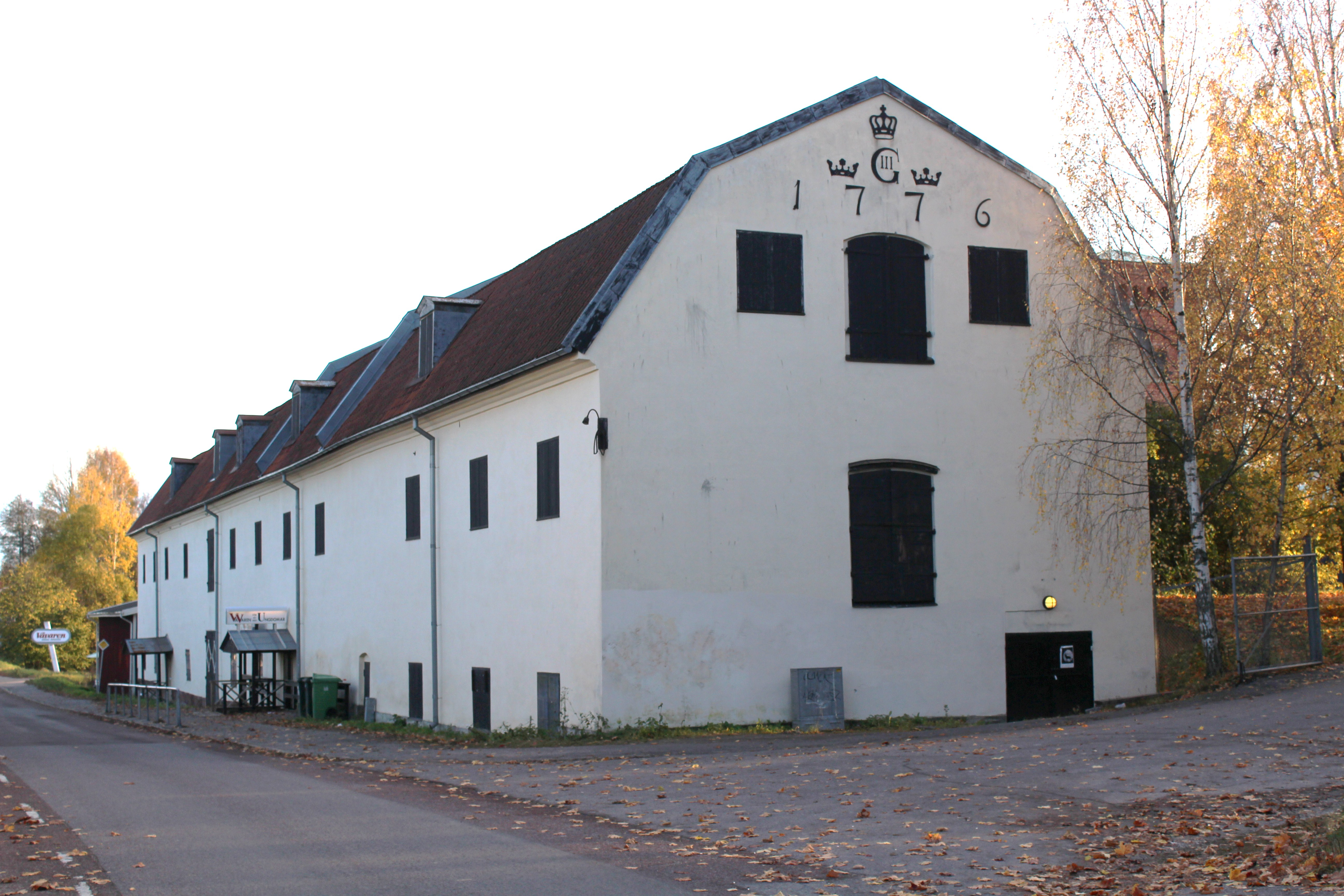 GÄVLE STRÖMSBRO 77:6 - husnr 4, STRÖMSBRO KRONOBRÄNNERI